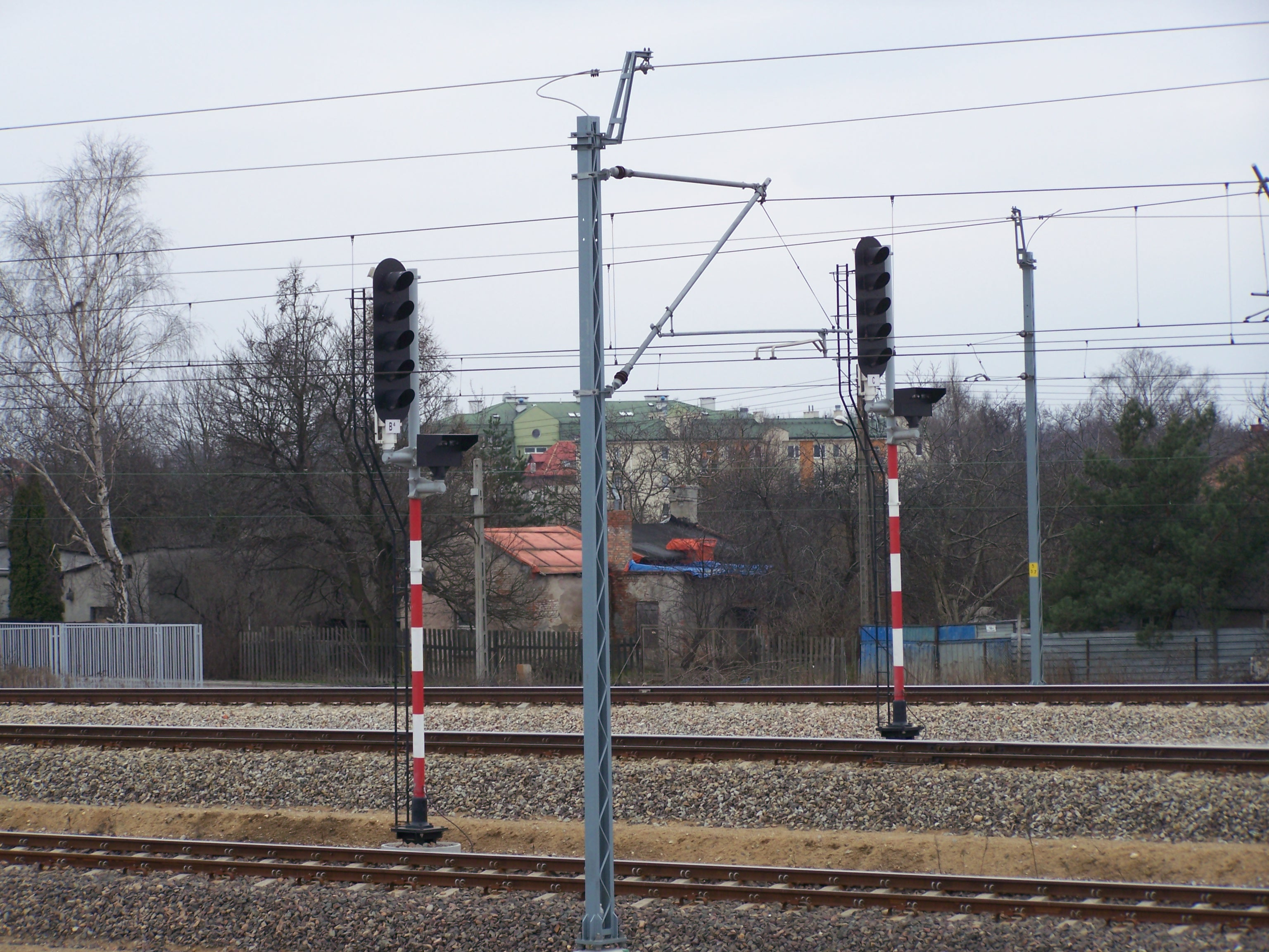 Warszawa Aleje Jerozolimskie. Semafory wjazdowe od strony północnej.